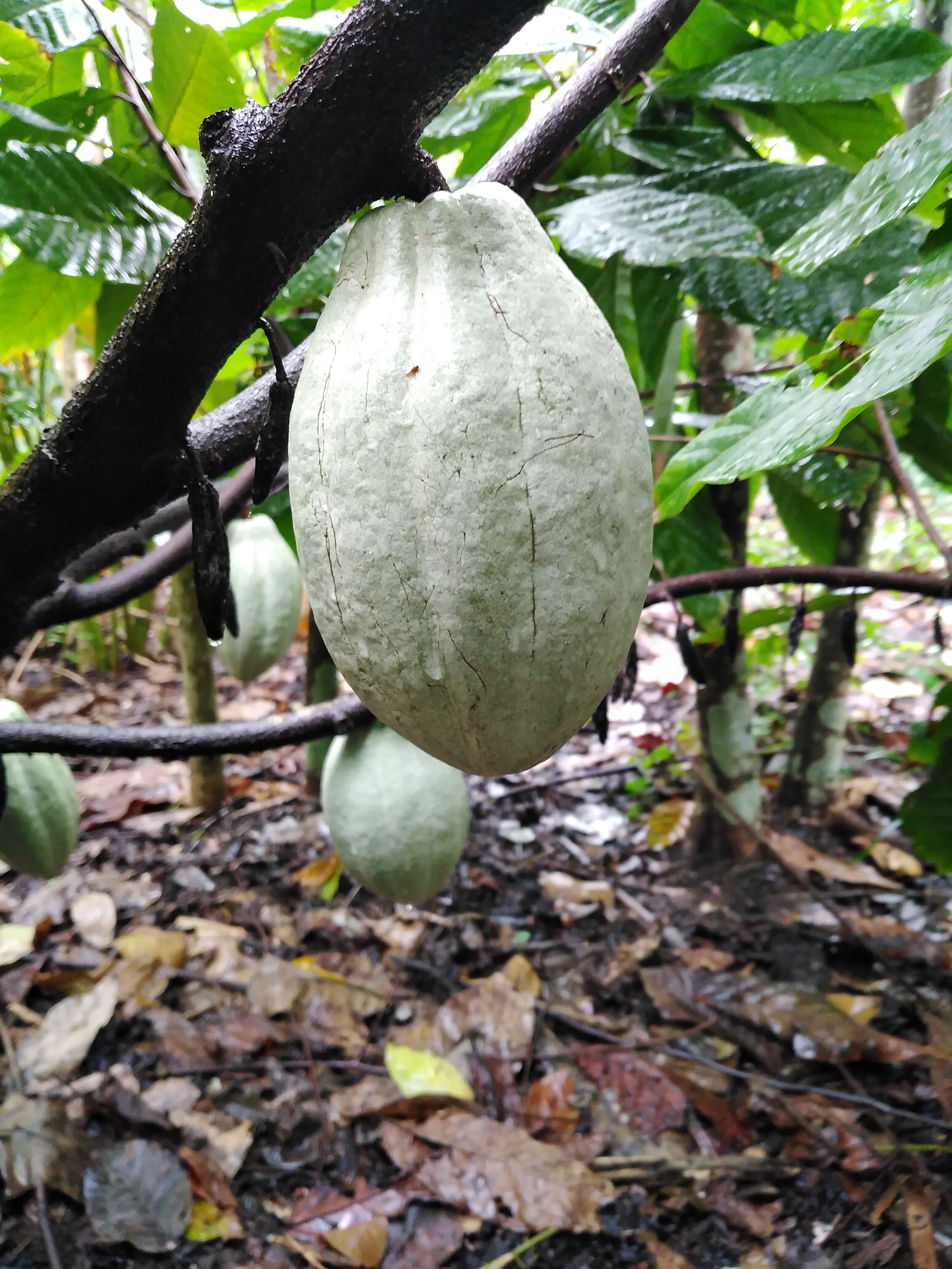 Cacao tipo de melón